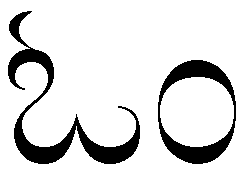 OM